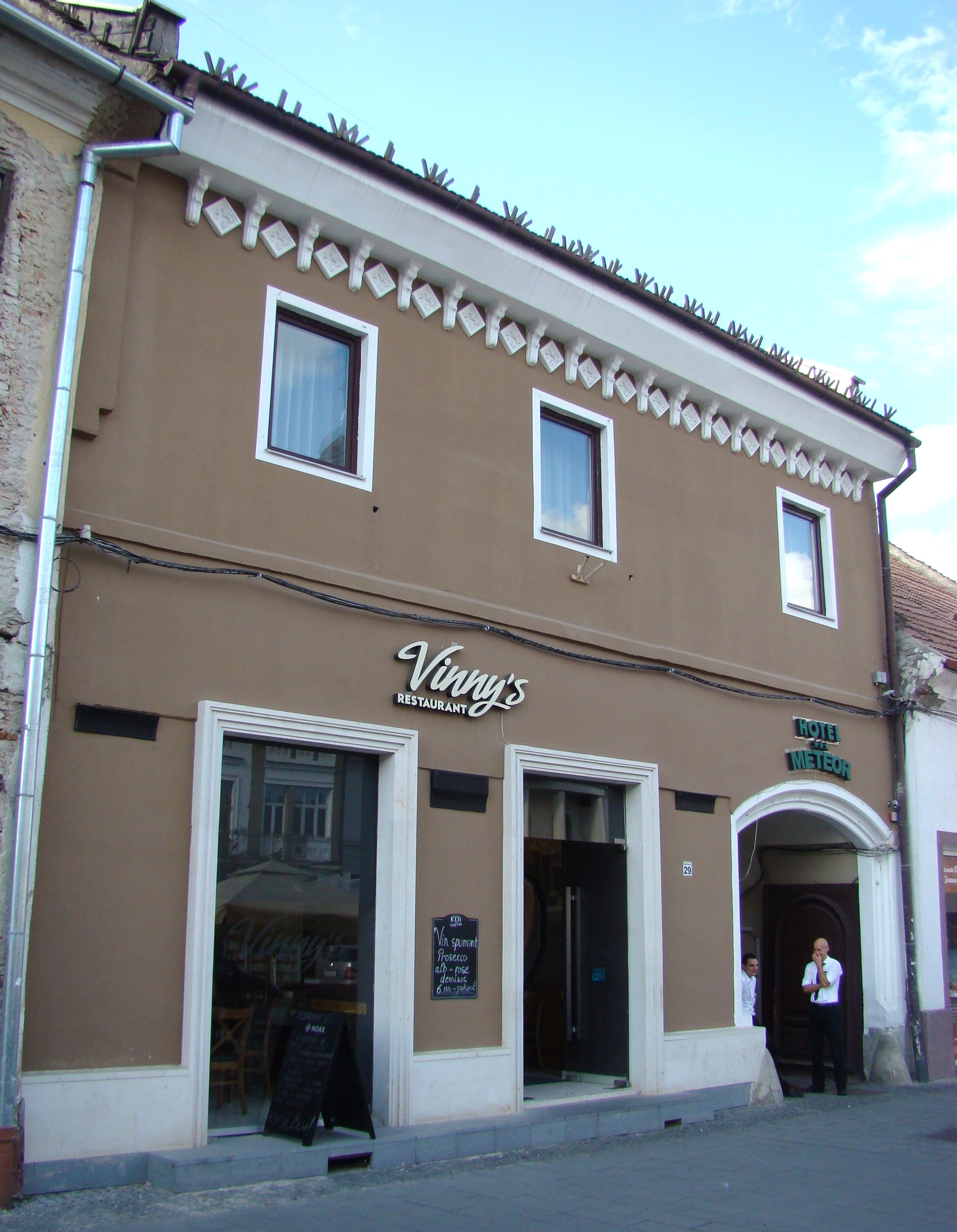 Clădire monument istoric, Bd.Eroilor, nr. 29